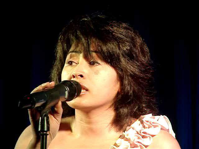 Poopy en concert